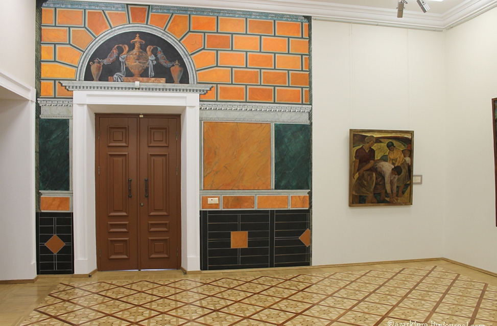 Сядзіба Пшаздзецкіх. Адноўленыя роспісы